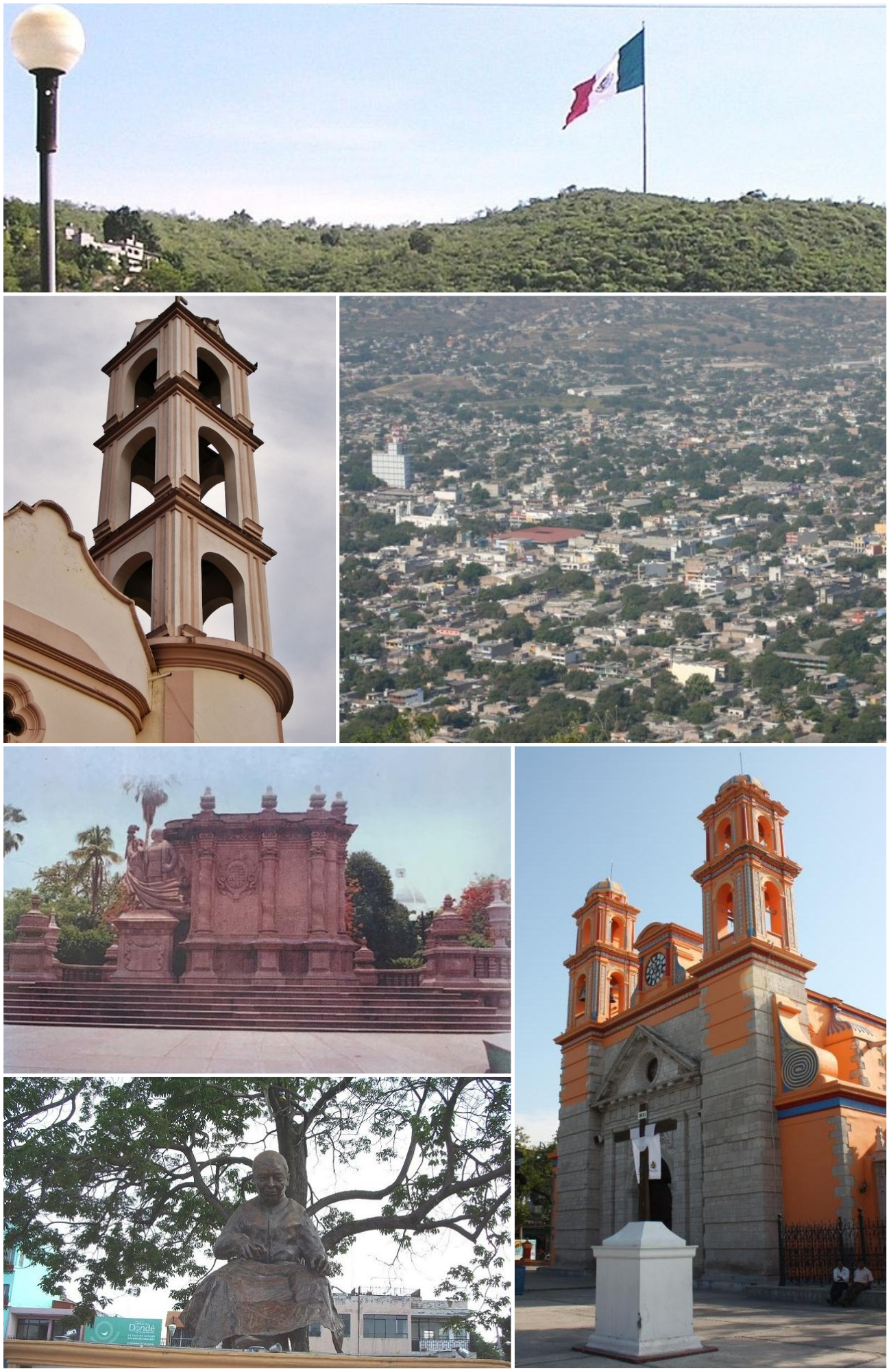 Iguala de la Independencia